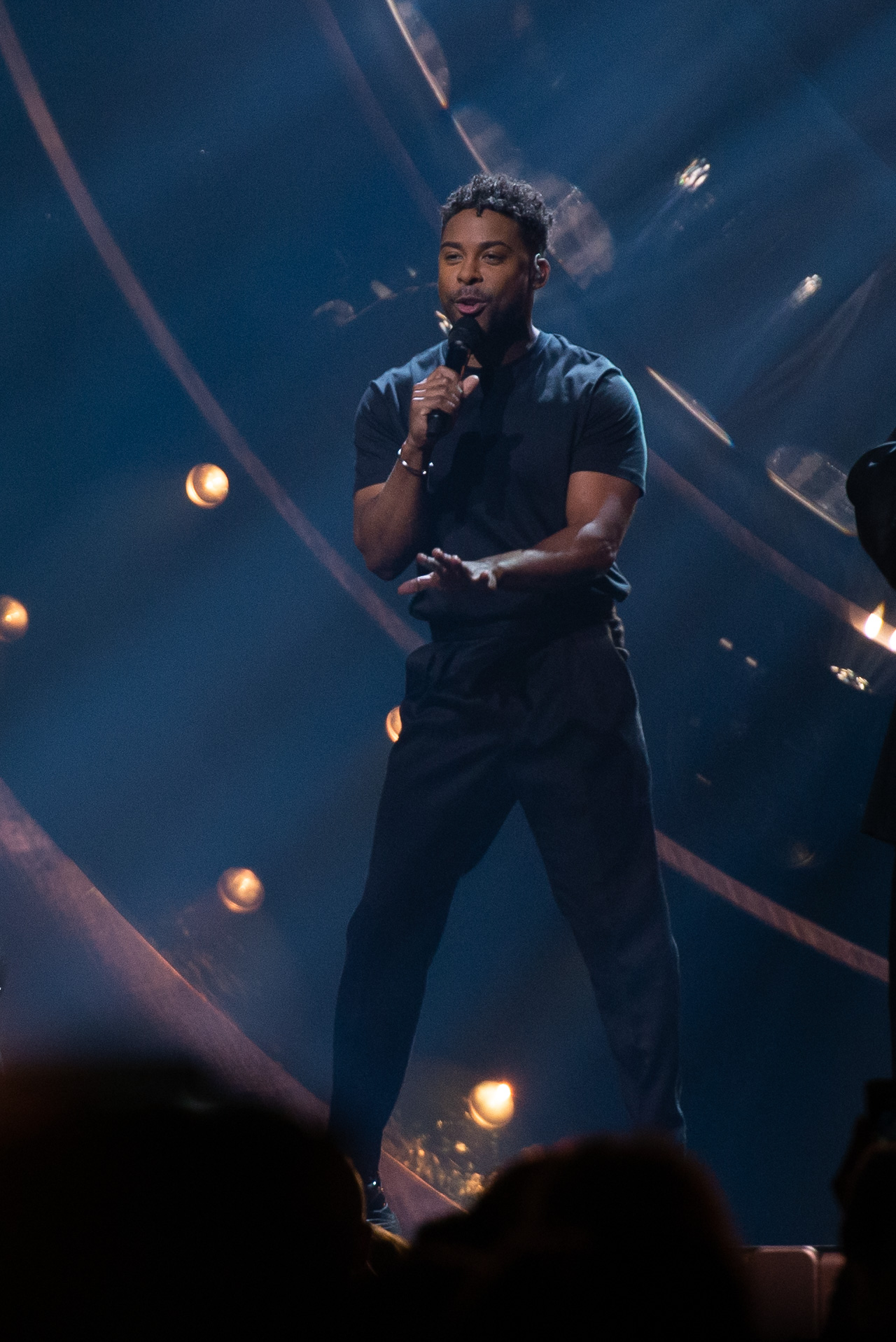 John Lundvik, Melodifestivalen 2019, Final, Friends Arena, Solna